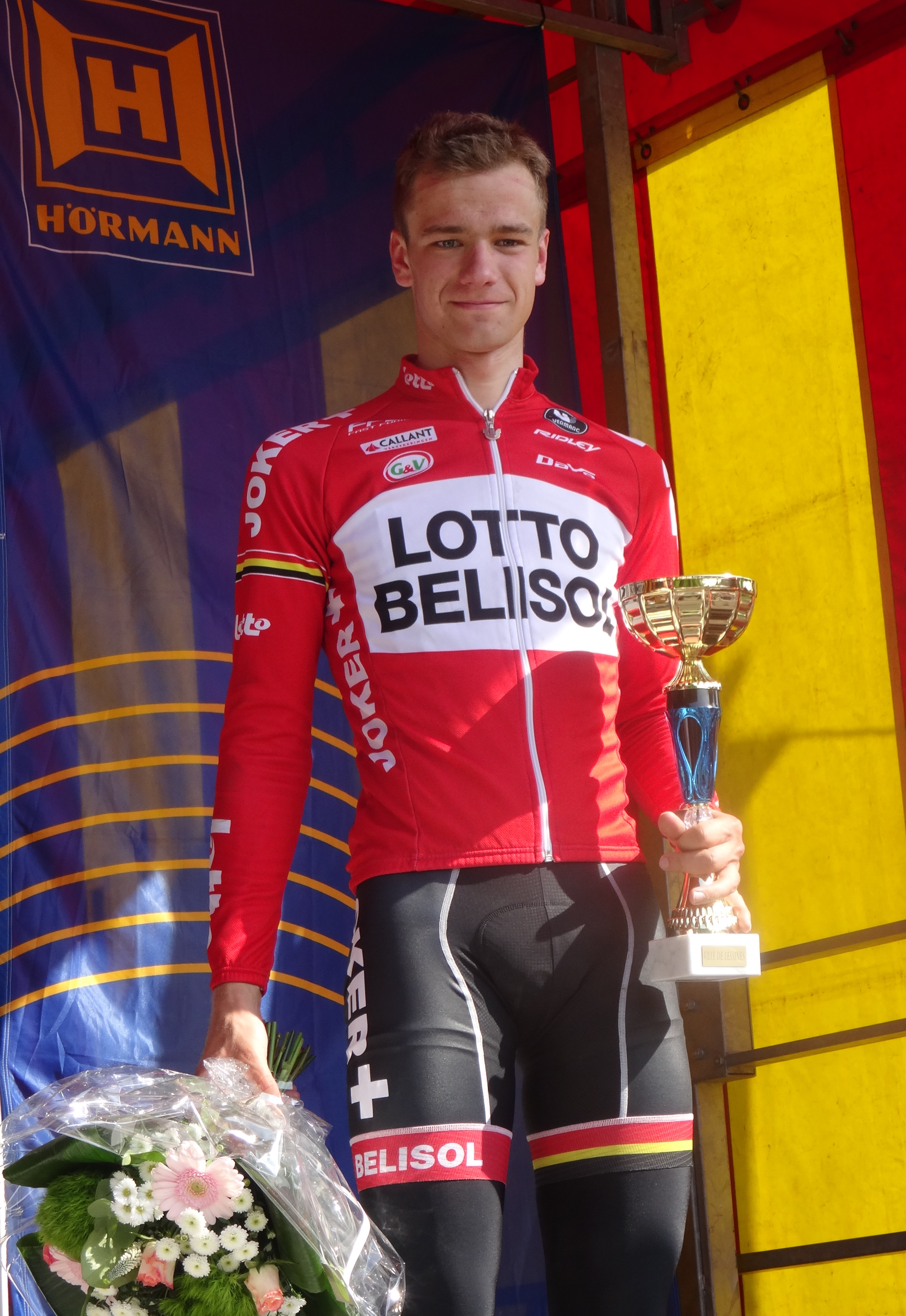 Grand Prix Criquielion 2014, Deux-Acren. Depicted person: Kevin Deltombe Depicted team: Lotto-Belisol U23